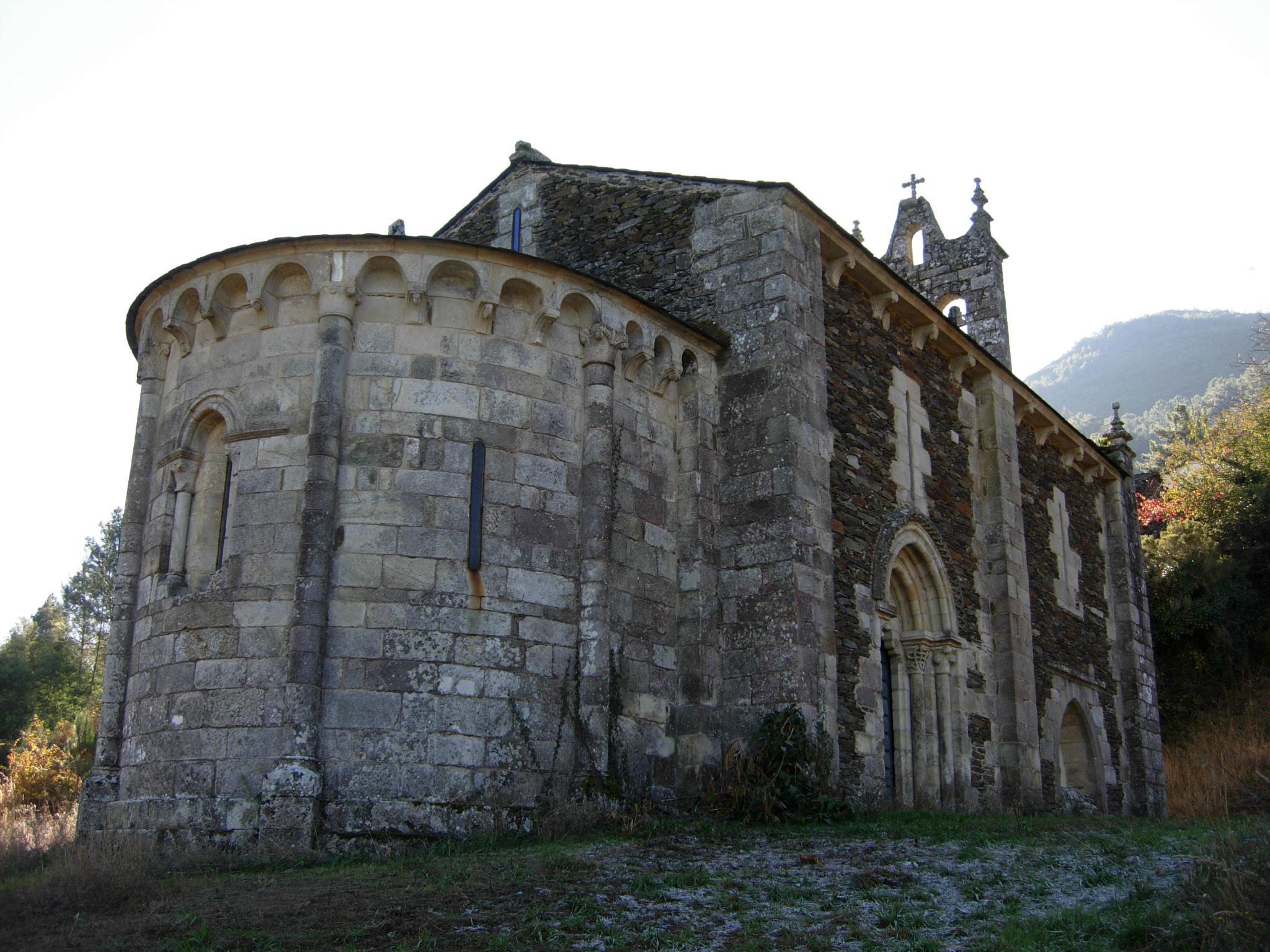 Esta foto participa en el juego En otro lugar de Flickr.